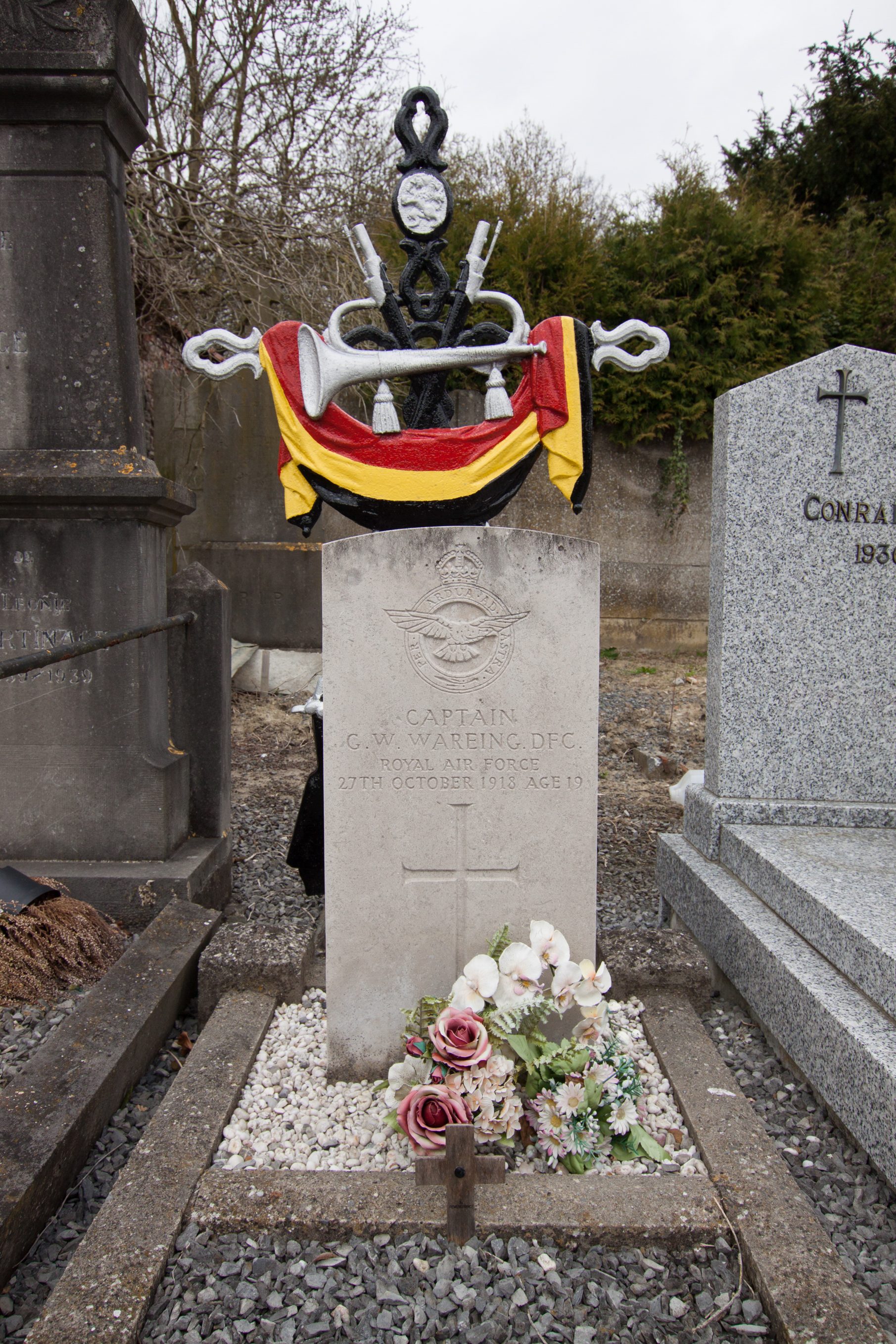 Rumillies Churchyard